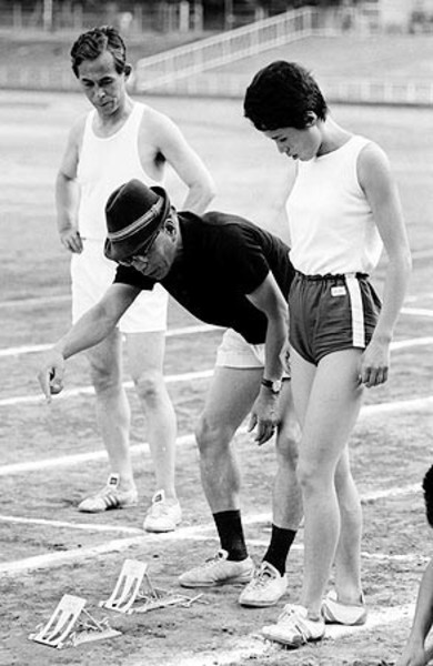 Left-right: Naoto Tajima, Takayoshi Yoshioka, Ikuko Yoda